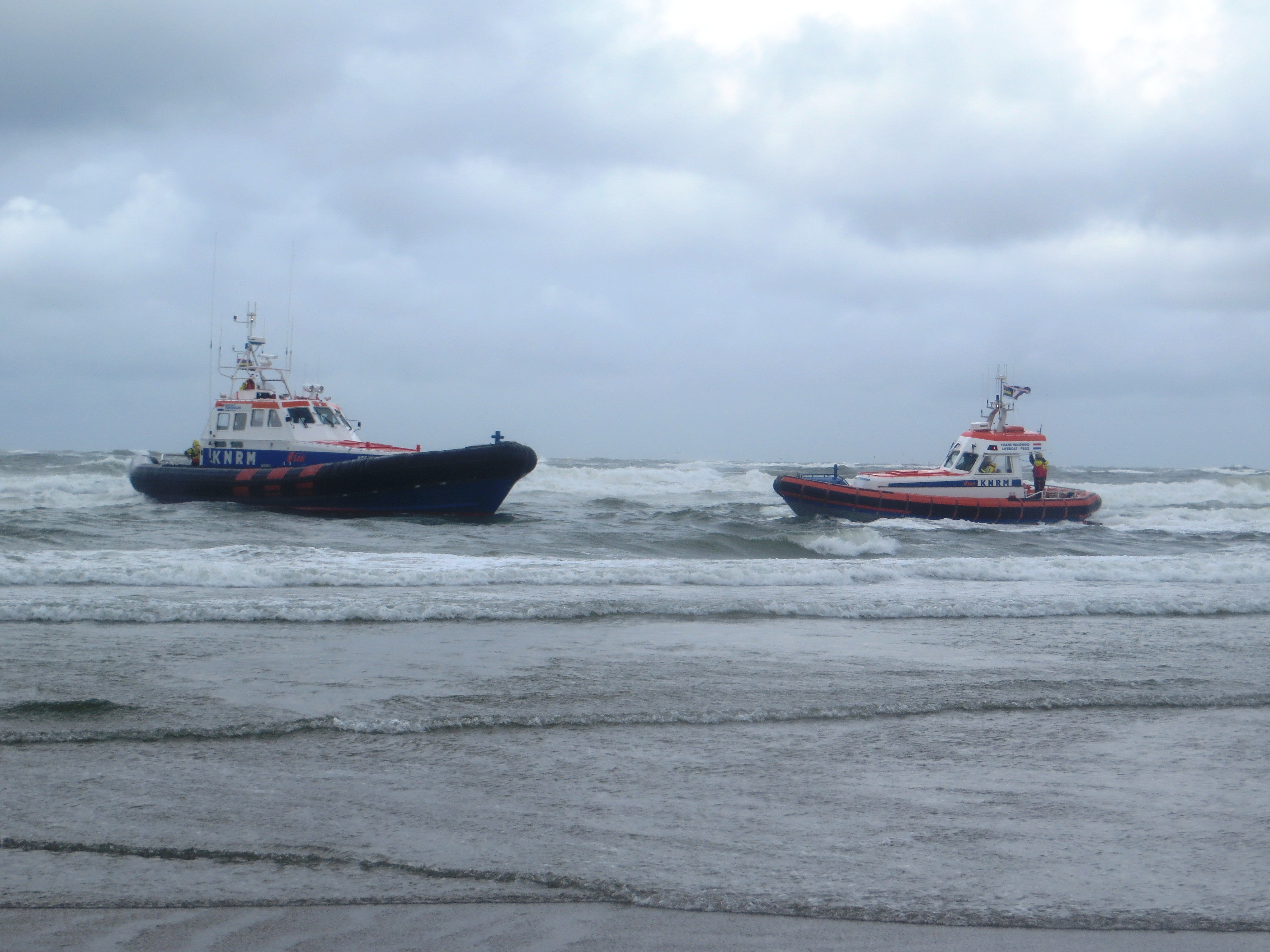 KNRM boot op zee